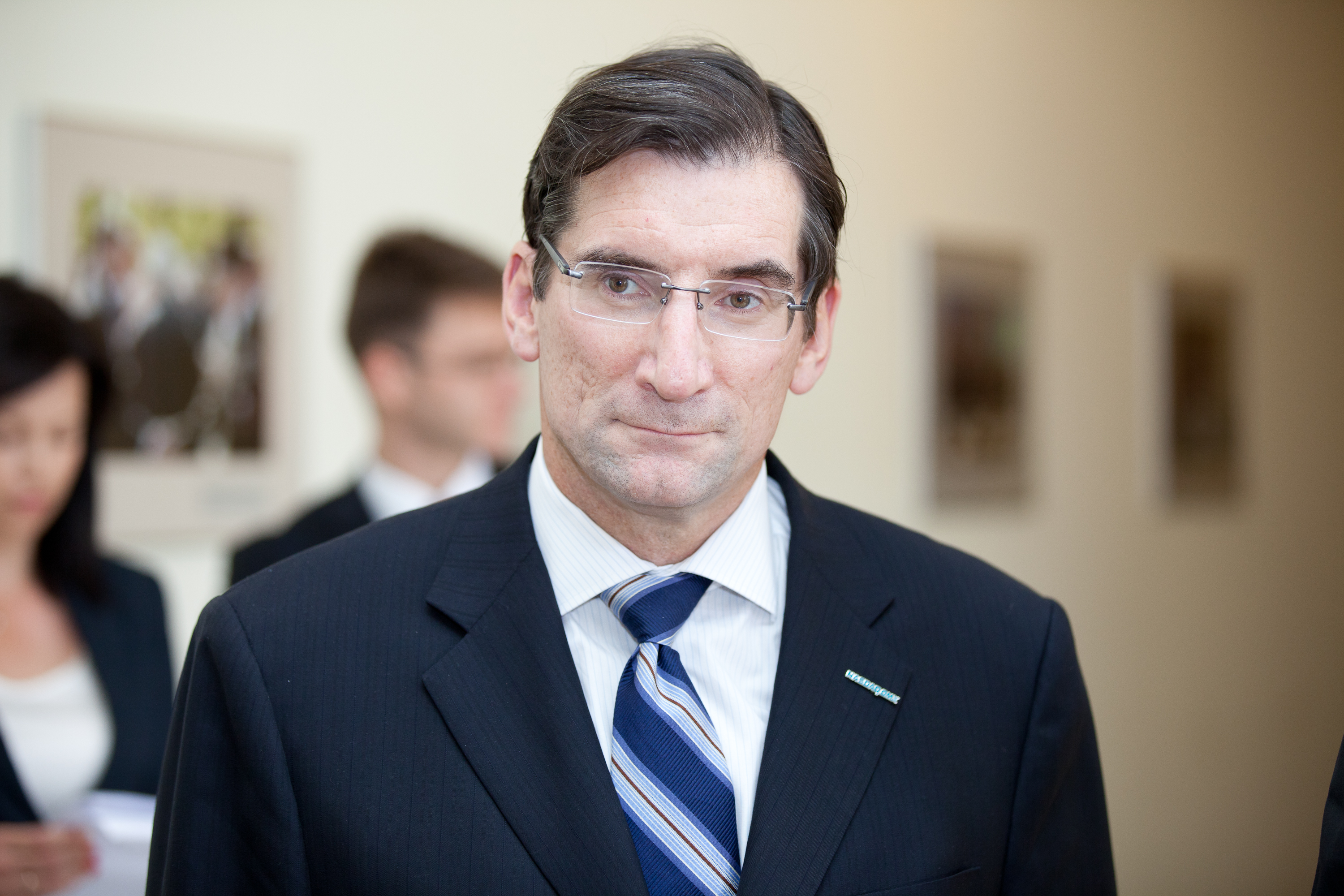 Robert Greifeld (Foto: Toms Norde, Valsts kanceleja)